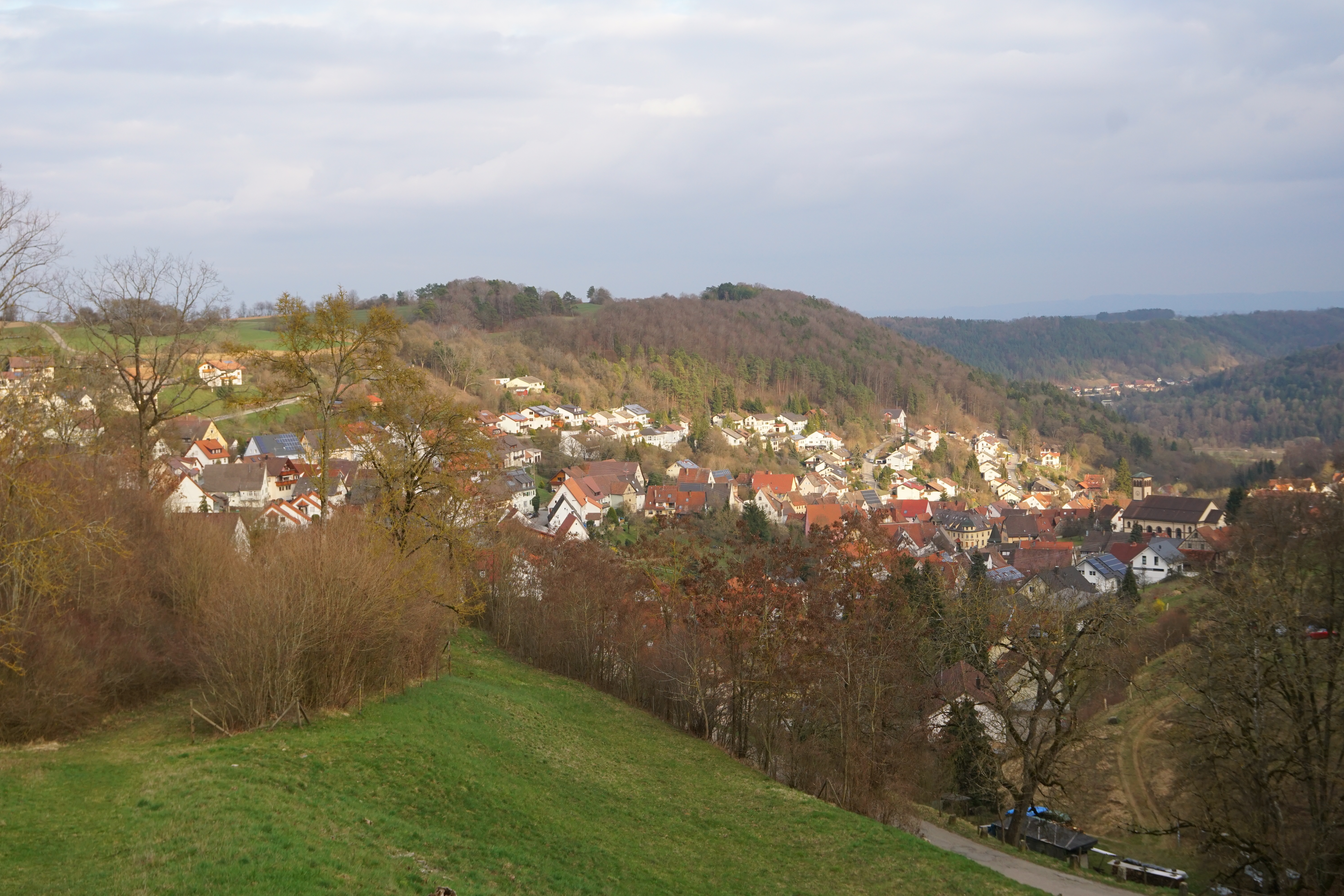 Ansichten von Rexingen (Horb am Neckar)